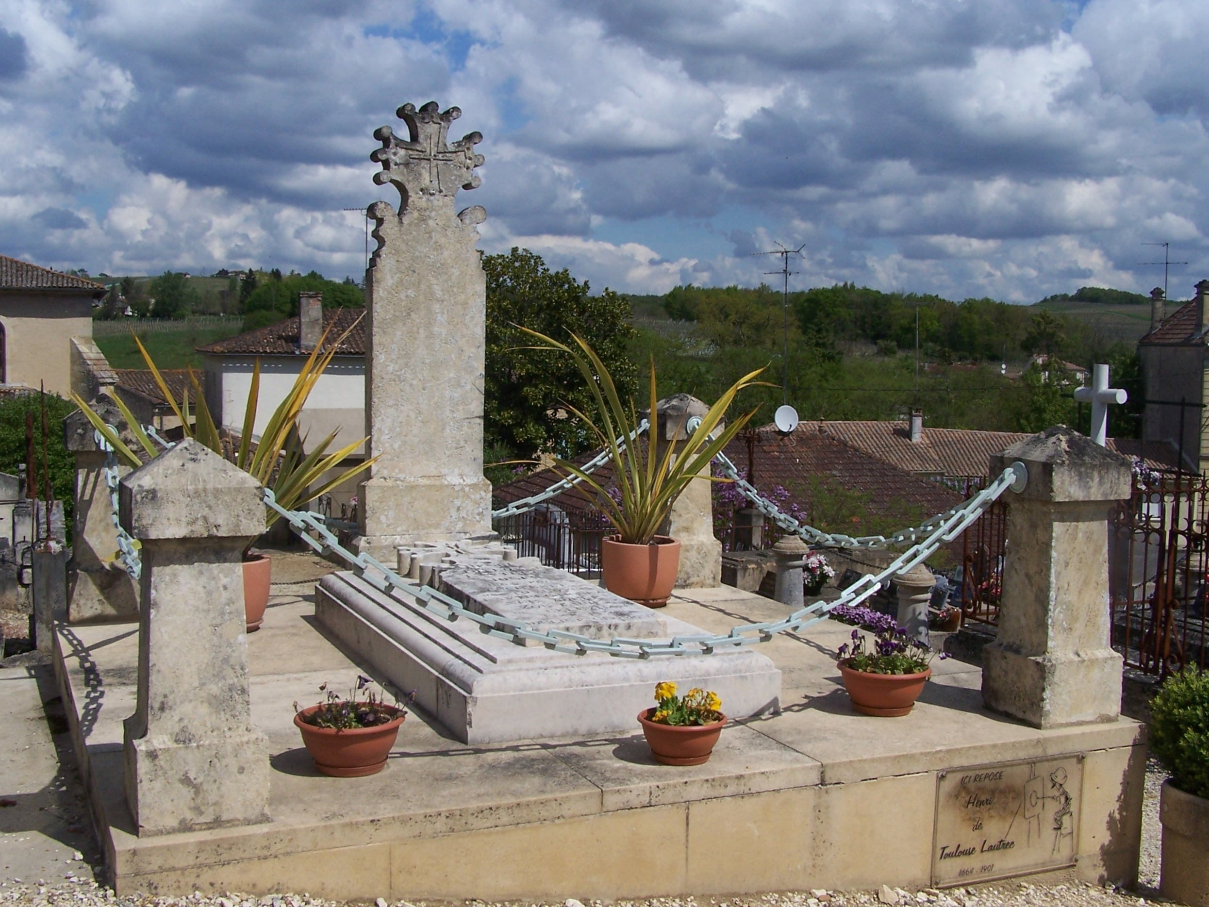 Tombe d'Henri de Toulouse-Lautrec à Verdelais, Gironde, France